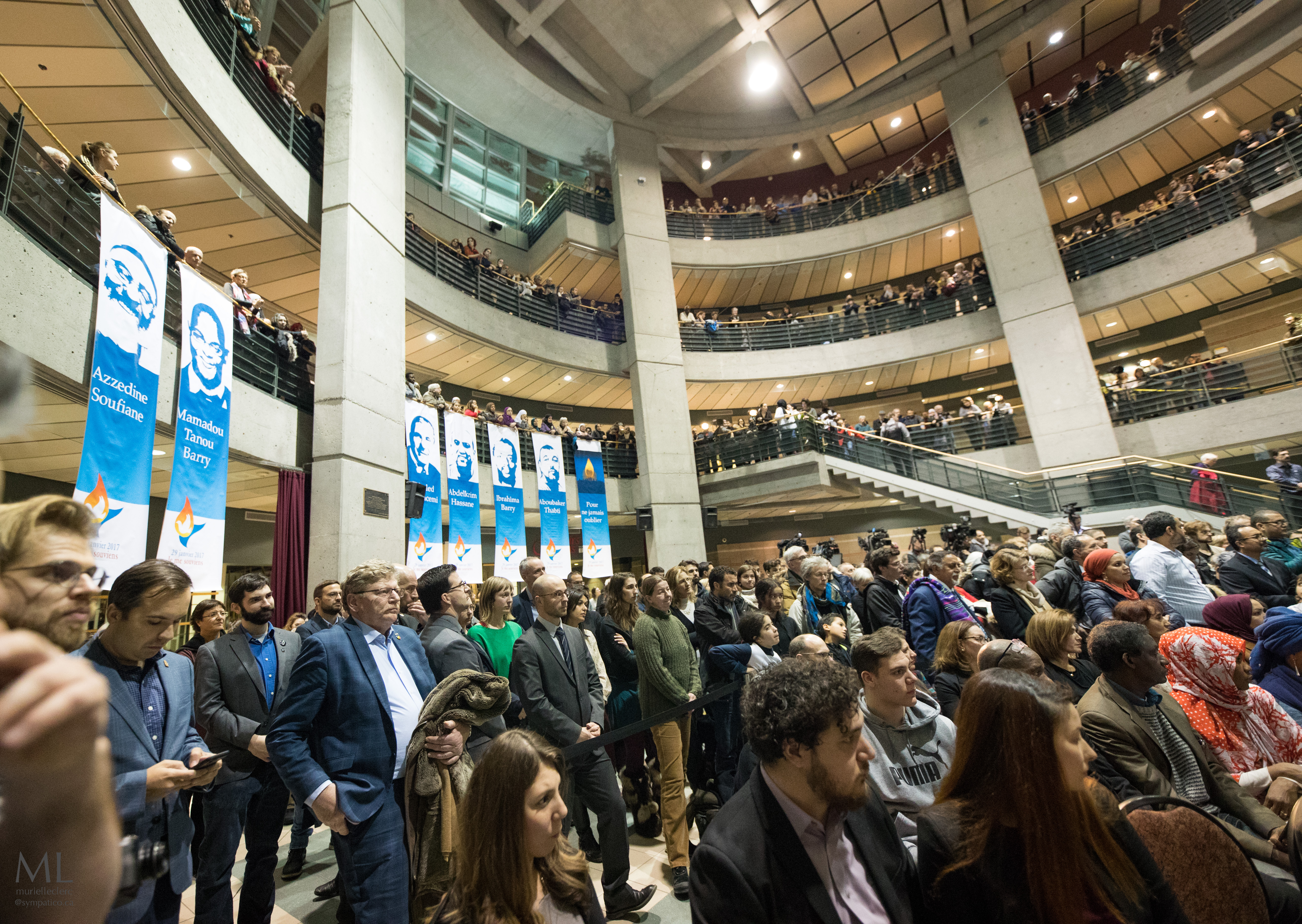 Commémoration de l'attentat à la mosquée de Québec (CCIQ). Cette 2e commémoration a eu lieu à l'Université Laval le 29 janvier 2019. La photo est l'oeuvre de Muriel Leclerc.